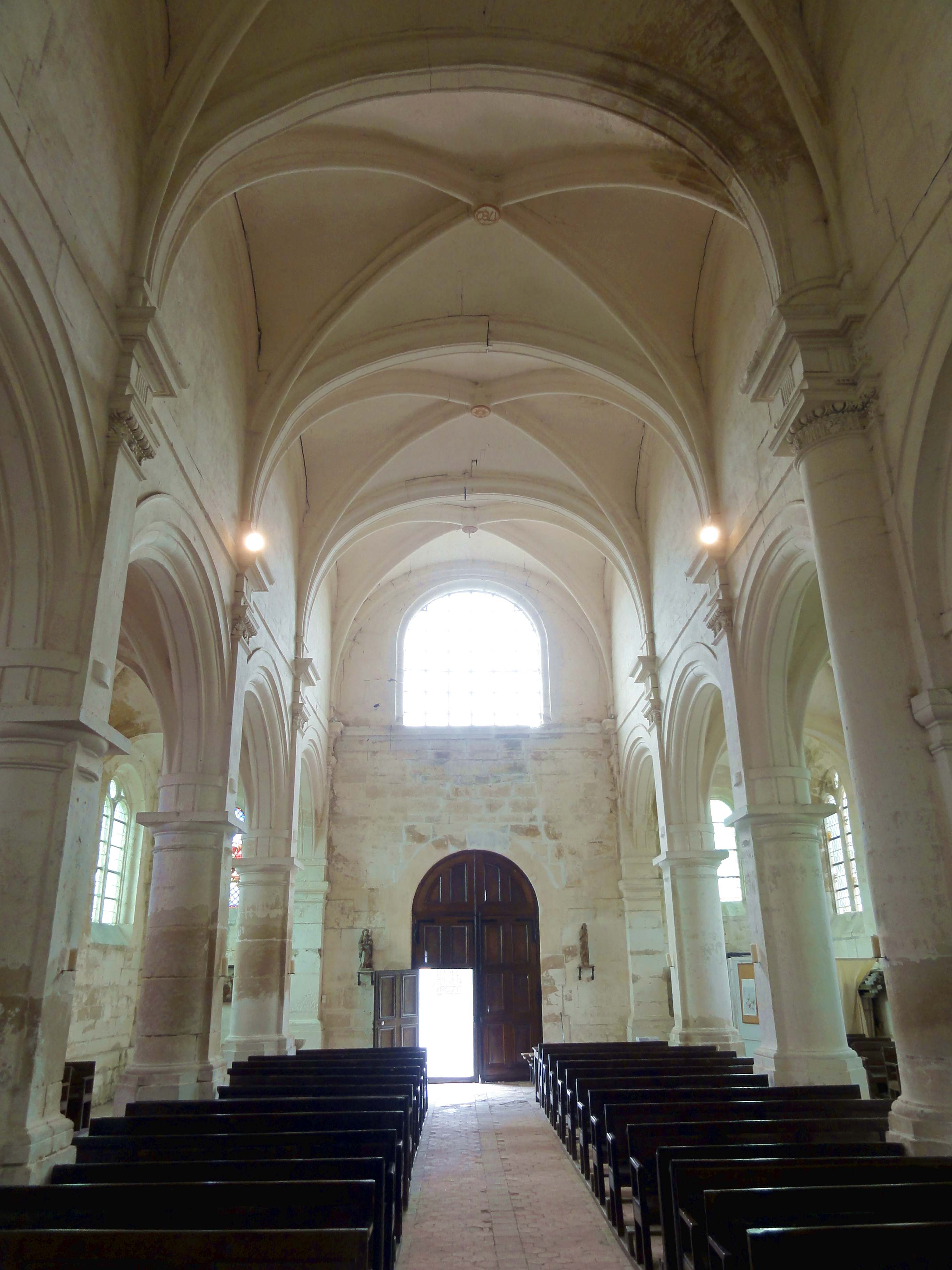 Intérieur de l'église (voir titre).